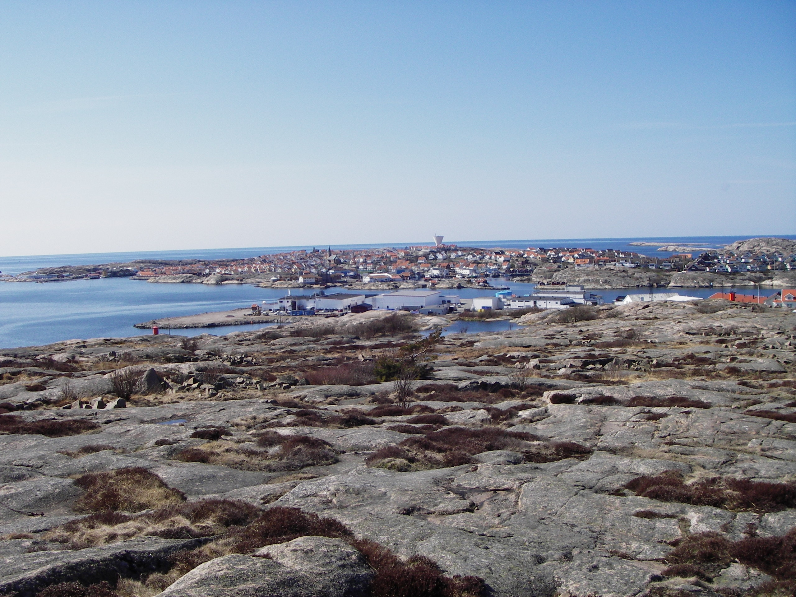 Smögen from Kungshamn